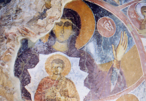 Богородица Платитера, олтарна апсида на пештерната црква посветена на Св. Лазар во село Бегниште, кавадаречко